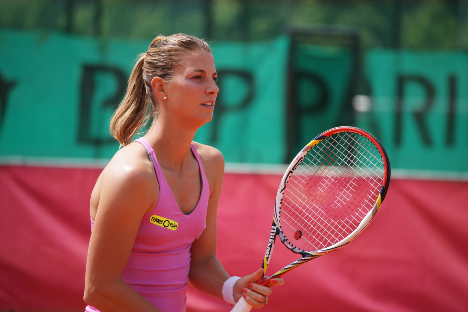 Mandy Minella ITF Cagnes-sur-Mer 2014